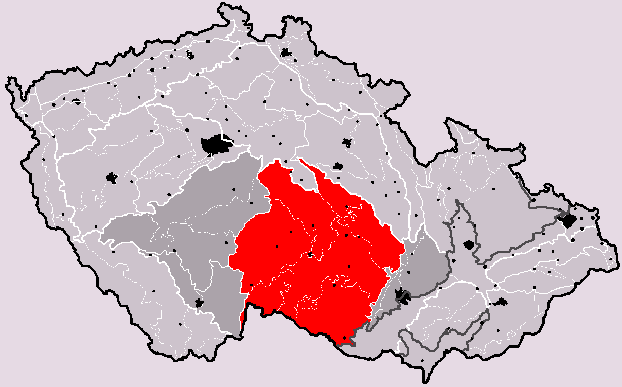 Poloha geomorfologické oblasti Českomoravská vrchovina v rámci České republiky. Hercynský systém Hercynská pohoří I Česká vysočina I2 (II) Česko-moravská subprovincie I2C (IIC) Českomoravská vrchovina